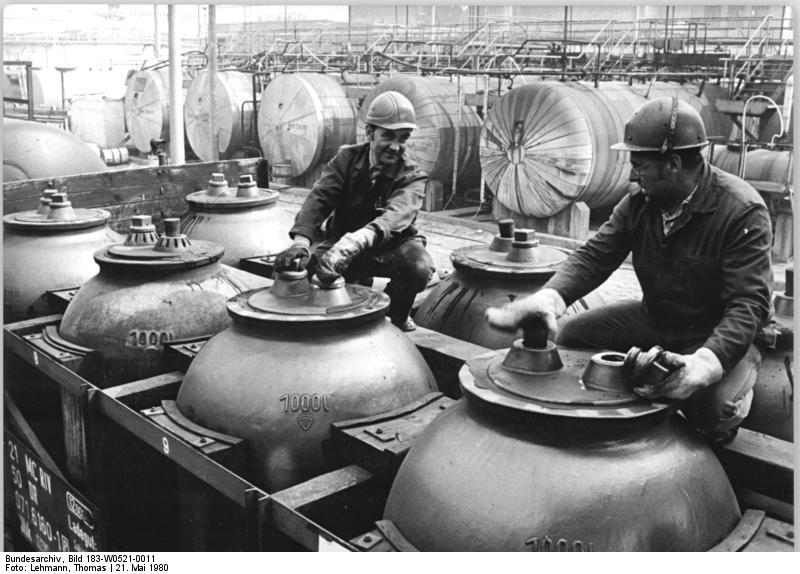 ADN-ZB-Lehmann-21-5-80-Ia-Bitterfeld: Wettbewerb-Durch noch effektivere Auslastung der Anlagen wollen die Werktätigen der Methan-Chlorierung des Chemiekombinates Bitterfeld eine zusätzliche Produktion von 50 Tonnen Methylenchlorid erreichen. Das ist ein wichtiger Grundstoff für die Filmindustrie, den der bekannte Bitterfelder Betrieb (CKB) sowohl für die benachbarte Filmfabrik Wolfen als auch für viele Exportkunden produziert.